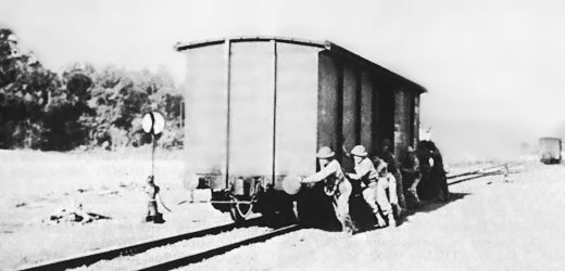 Alliierte retten einen Munitionswaggon (Tarlac, Philippinen - 1941)